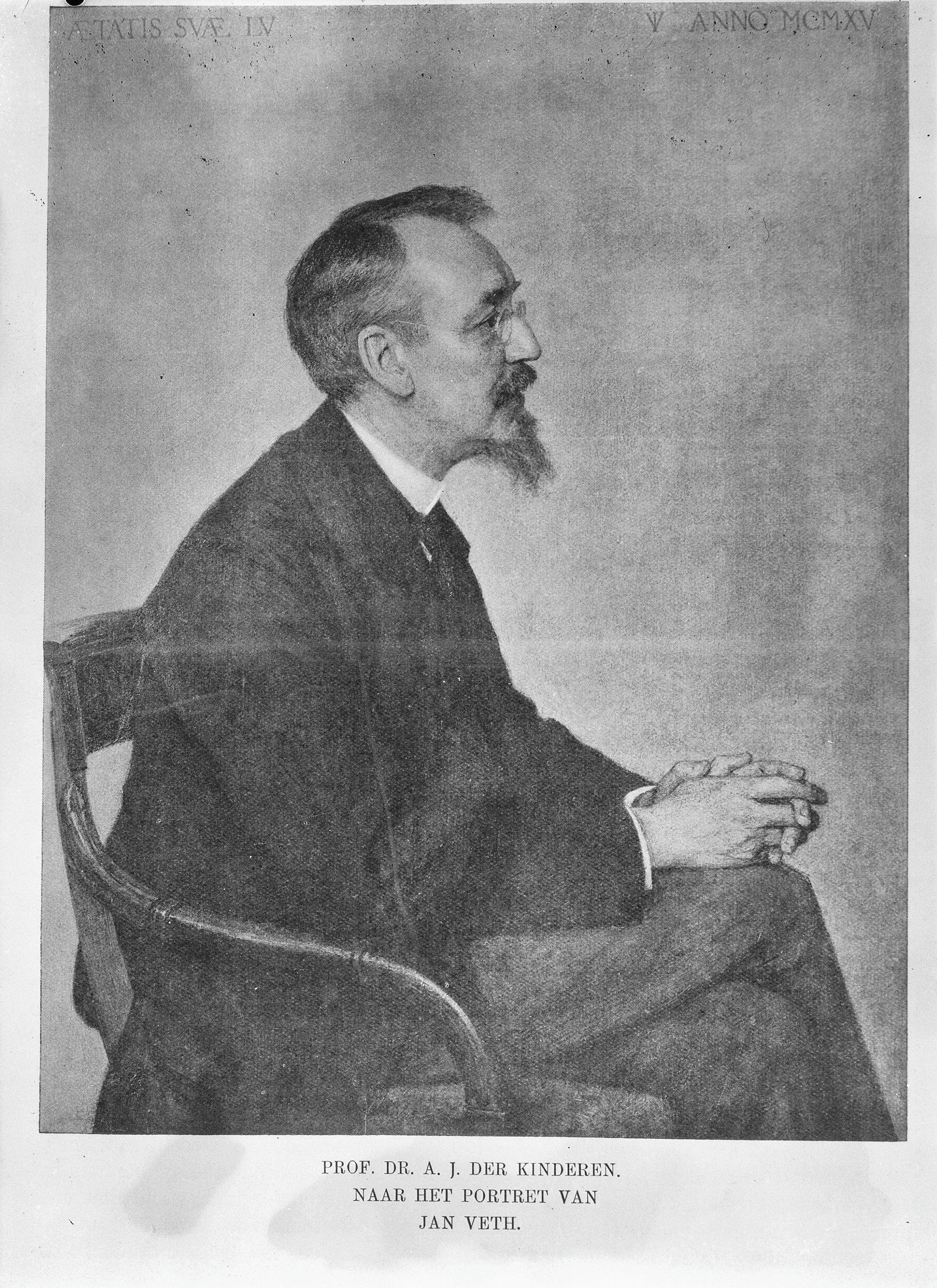 DIVERSEN: portret Prof.Dr.A.J. der Kinderen naar Jan Veth, reproductie Bouwkundig weekblad 1925